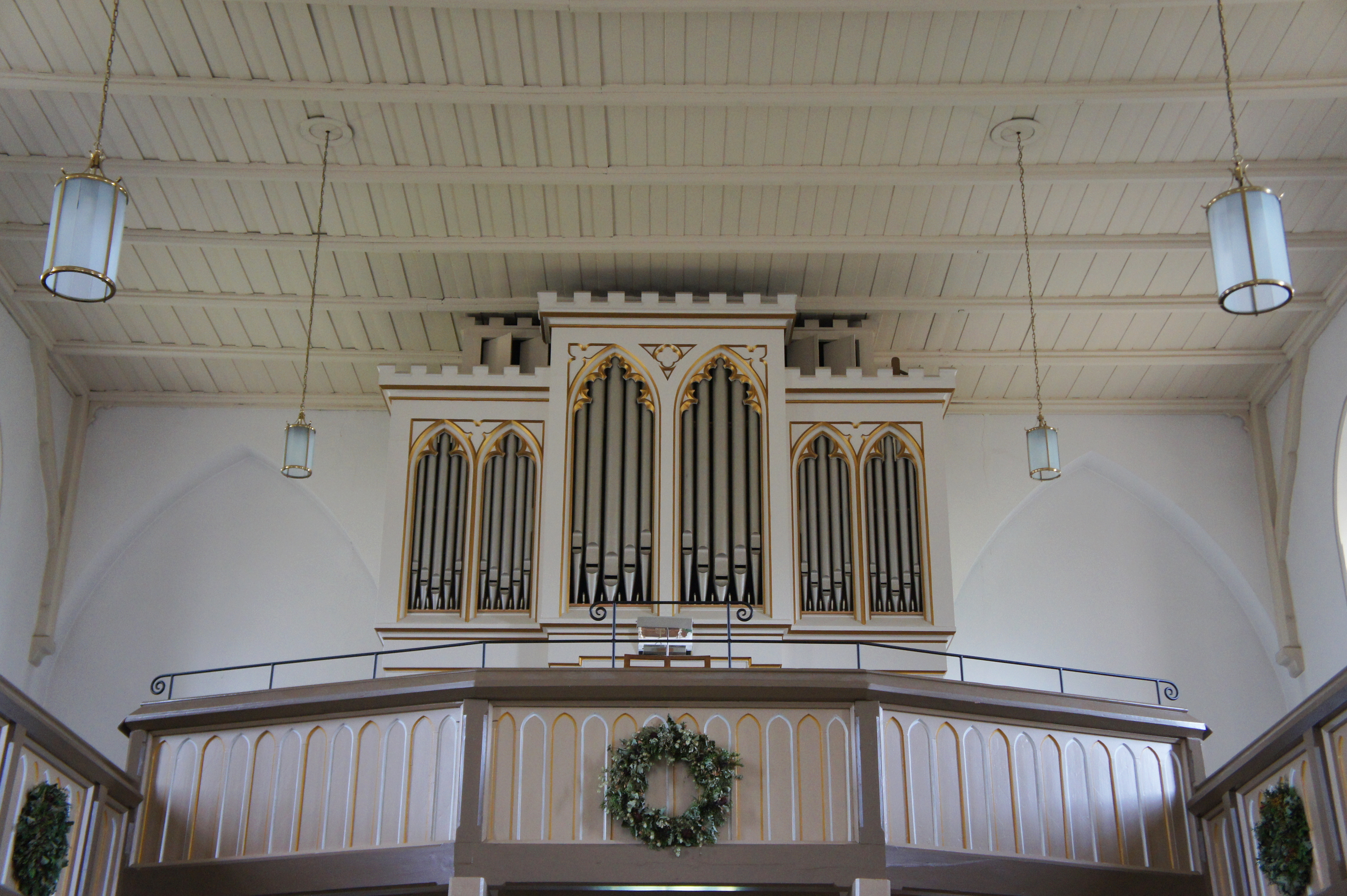 Kirche Ottendorf-Okrilla Die 1610 errichtete Kirche brannte 1873 infolge eines Blitzeinschlages ab, die neue Kirche wurde 1875 geweiht und 1995 saniert